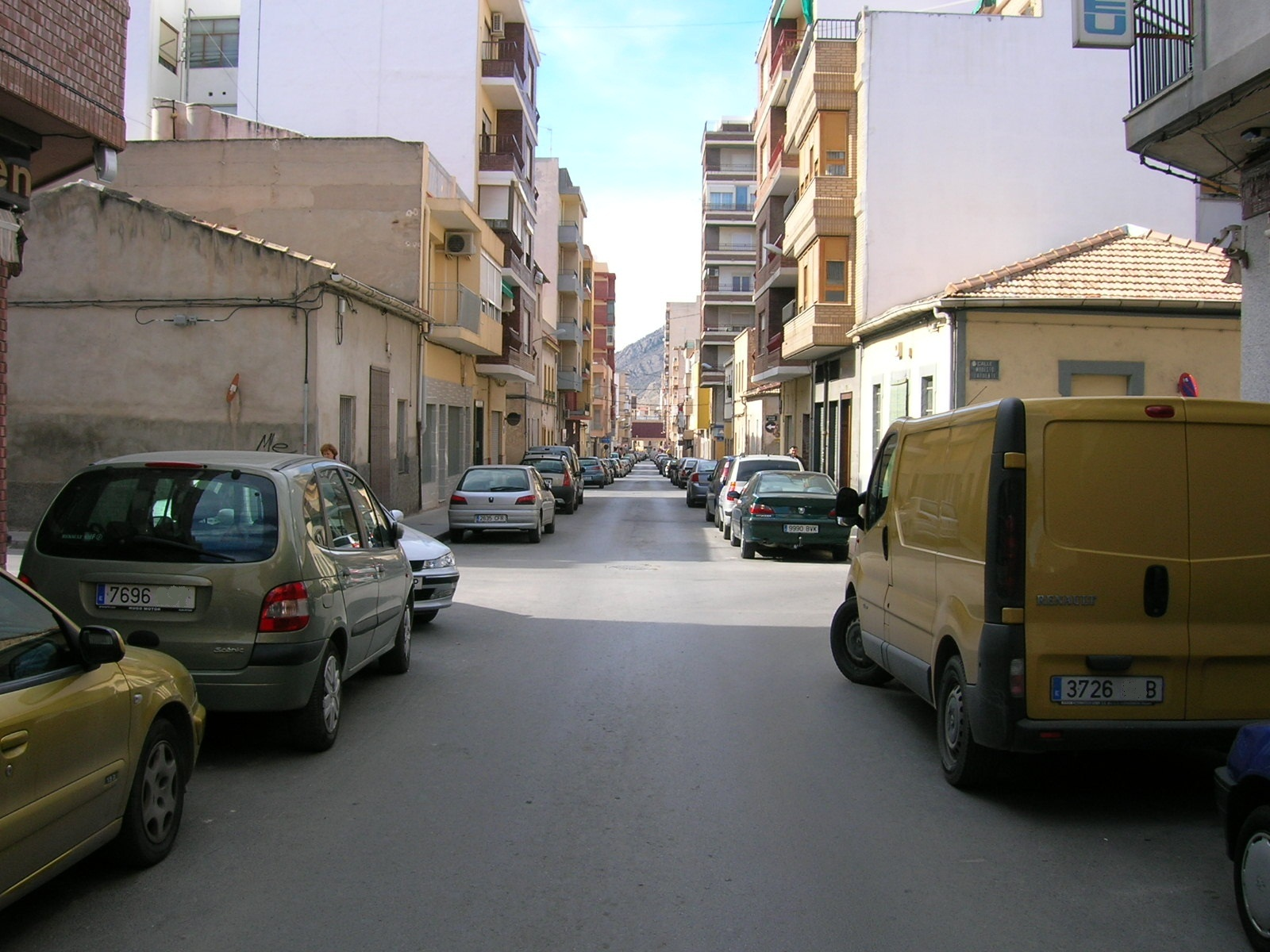 Calle típica de la Fraternidad, Elda